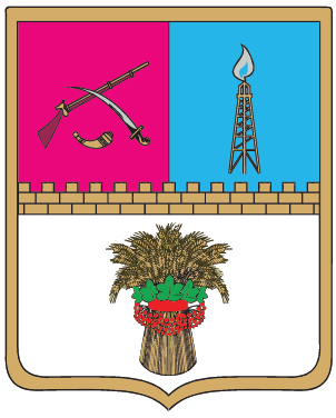 Герб Машвіського району